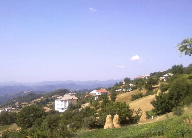 Аптовска махала, част от село Гърнати, Област Смолян.